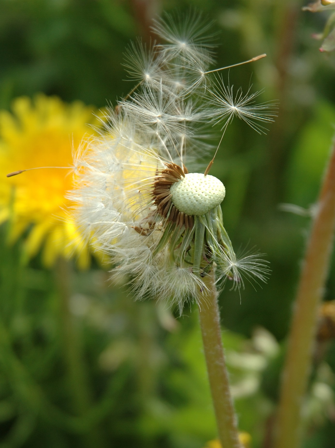 Taraxacum (タンポポ)